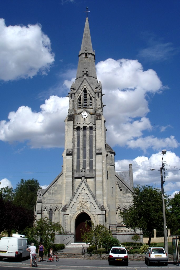 Photo prise par mes soins, il s'agit de l'église Vimy 62580 France